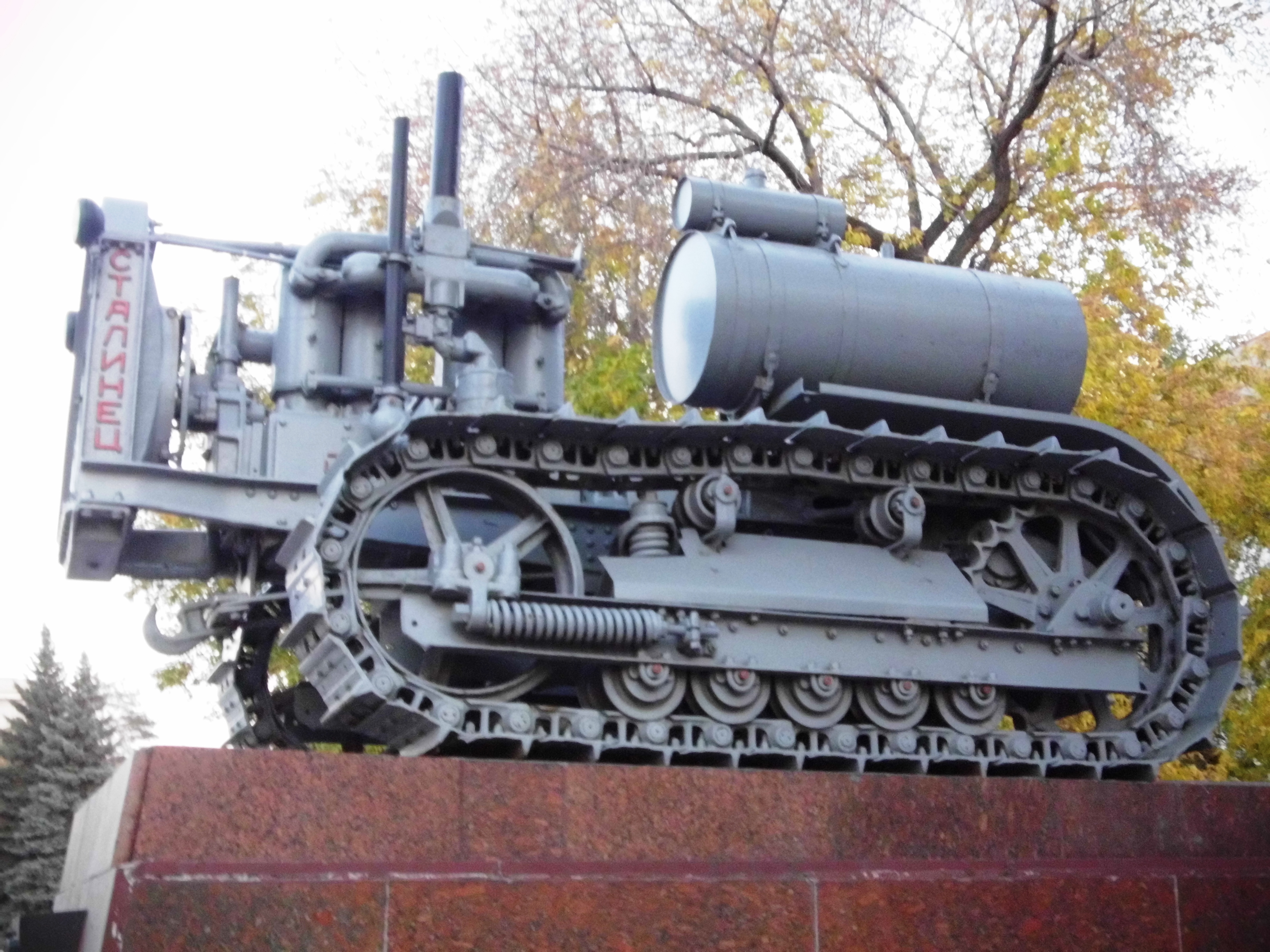 Памятник «Первенец ЧТЗ - трактор С-60»: проспект Ленина, 3 (перед зданием заводоуправления), город Челябинск, Челябинская область.